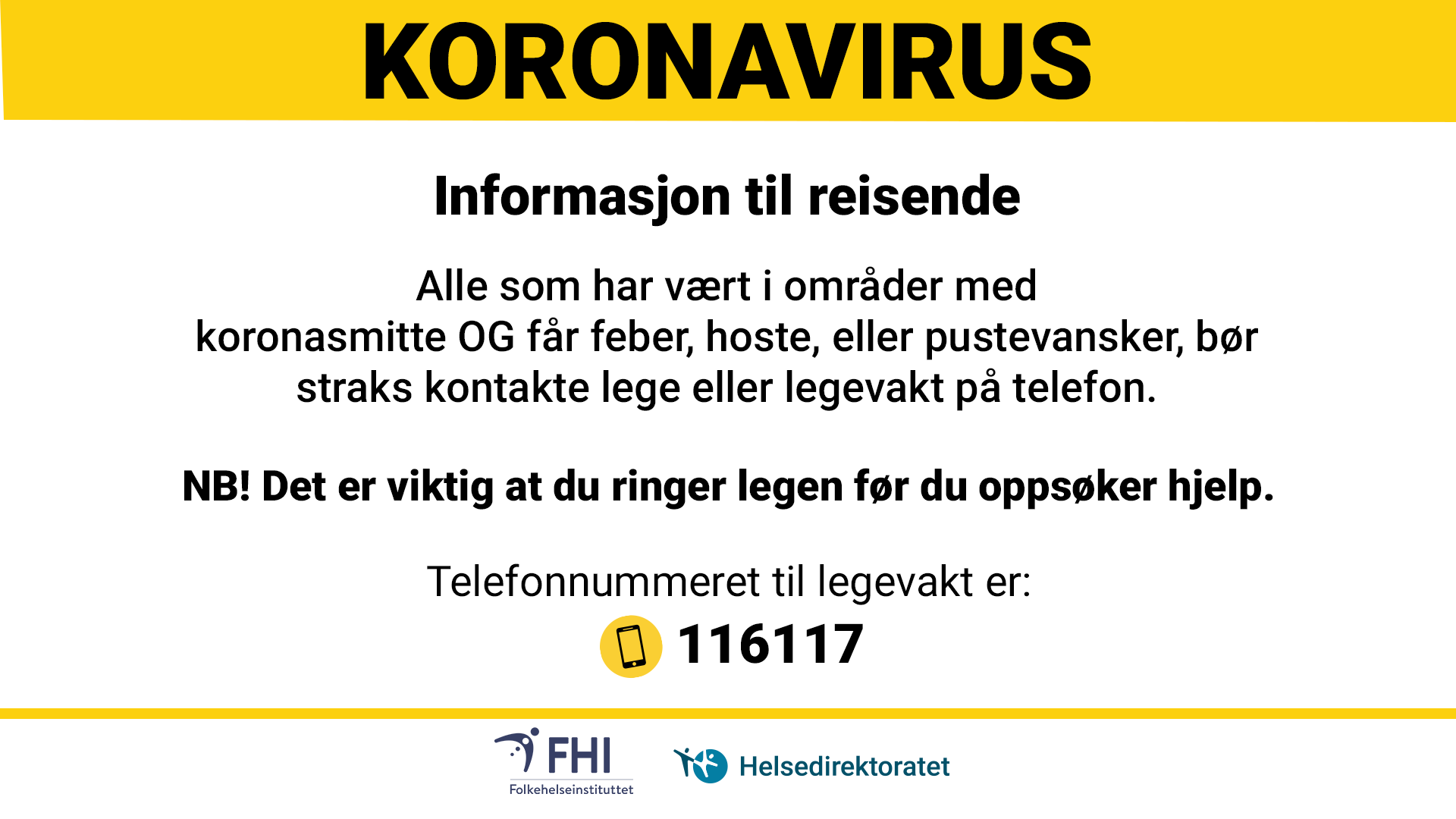 Offisiell plakat fra myndighetene med informasjon om koronavirus